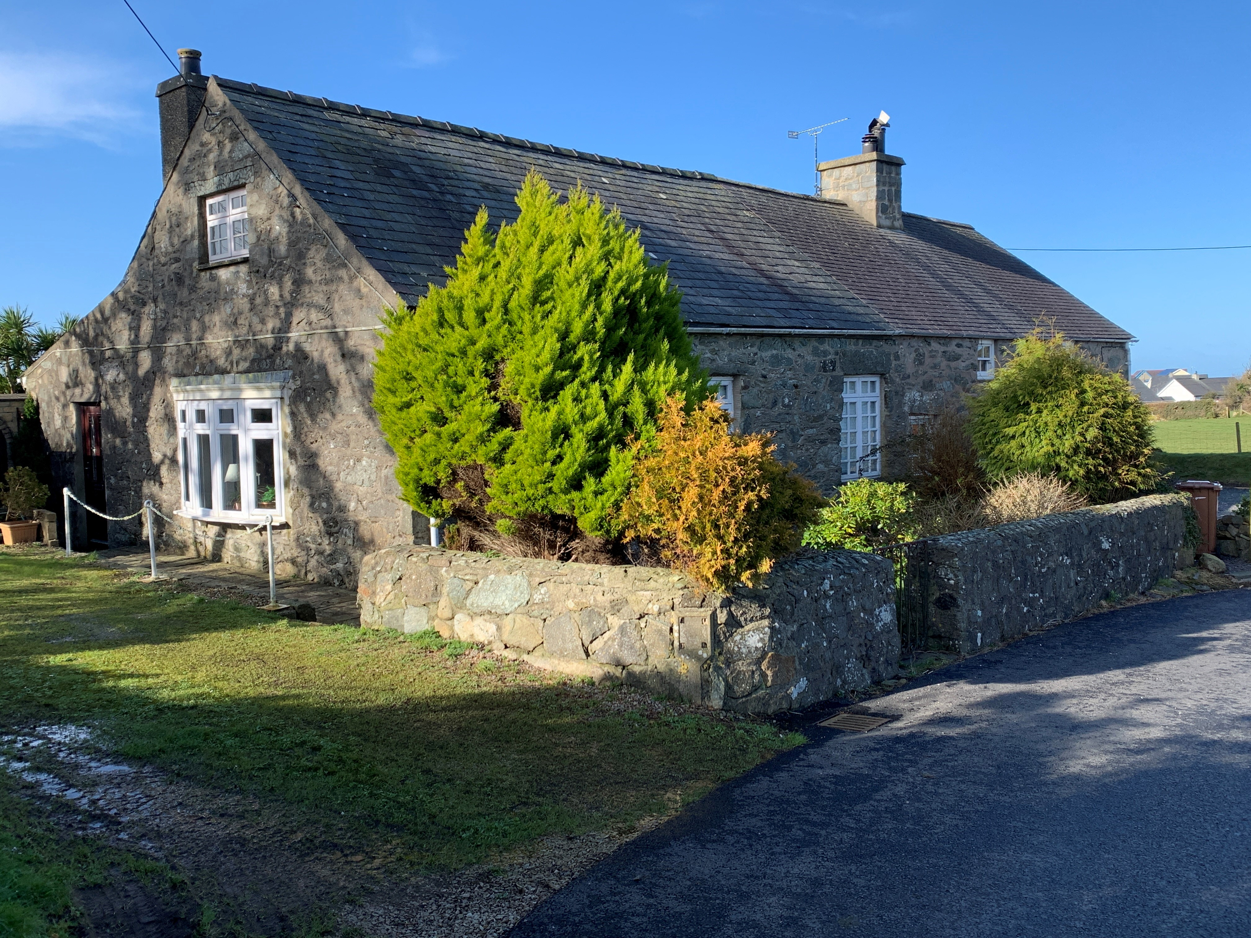 Capel Berseba, 2020.